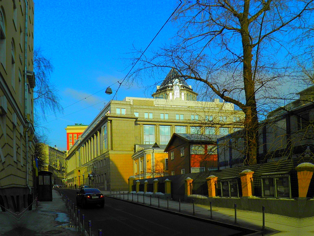 вознесенскийПЕРЕУЛОК